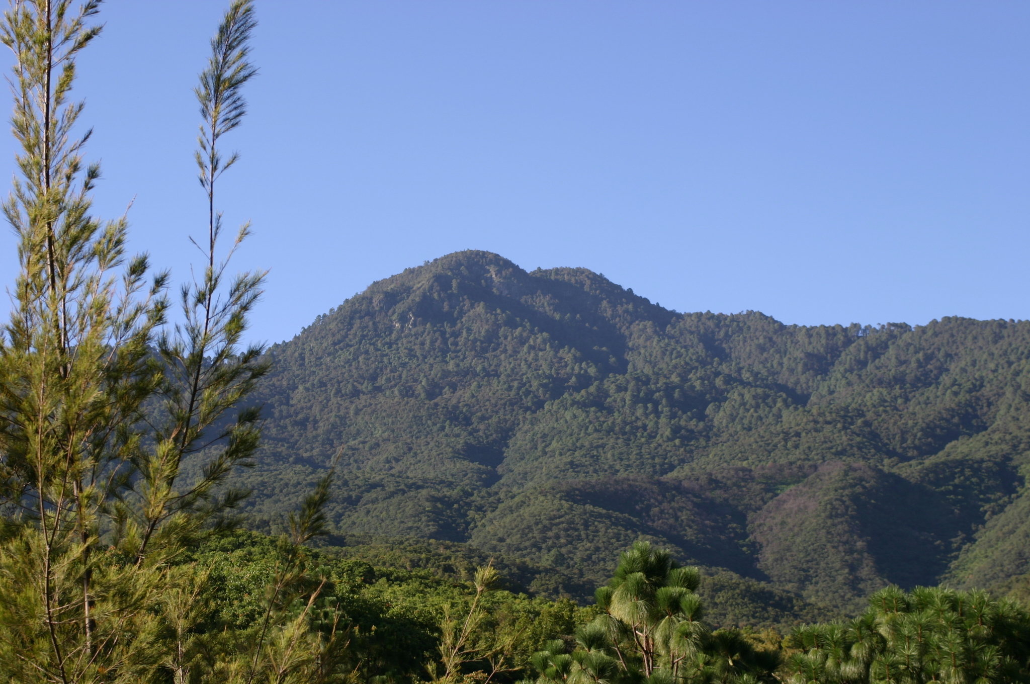 Cerro San Felipe, Oaxaca, Oaxaca, Mexico